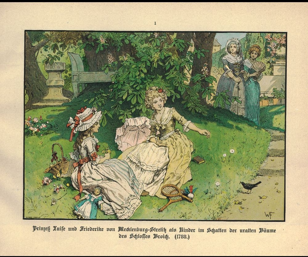 Prinzessin Luise und Friederike als Kinder im Schatten alter Bäume auf Schloß Broich [Anm.: Das Datum 1788 ist nicht korrekt, da die beiden 1787 und 1791 auf Schloss Broich zu Besuch waren]